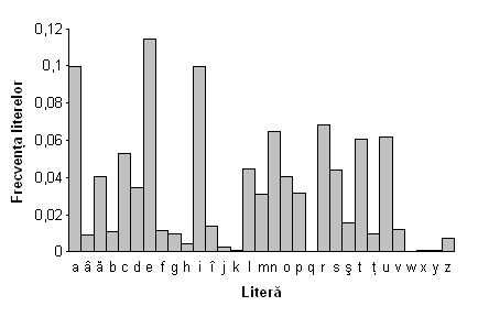 Frecvența literelor în limba română